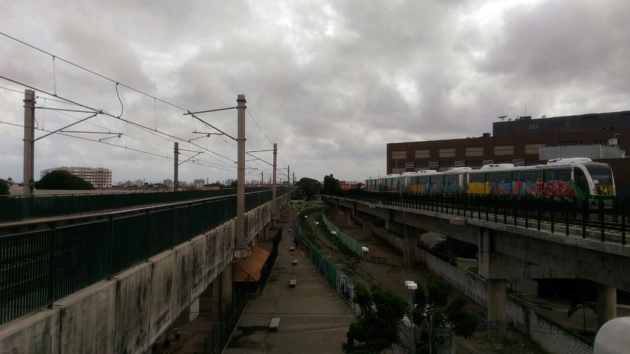 Elevados do Metrô (esquerda) e do VLT (direita) no bairro Parangaba, vistas da estrutura principal da estação Parangaba. é possível ver a direita um VLT no sentido Mucuripe.